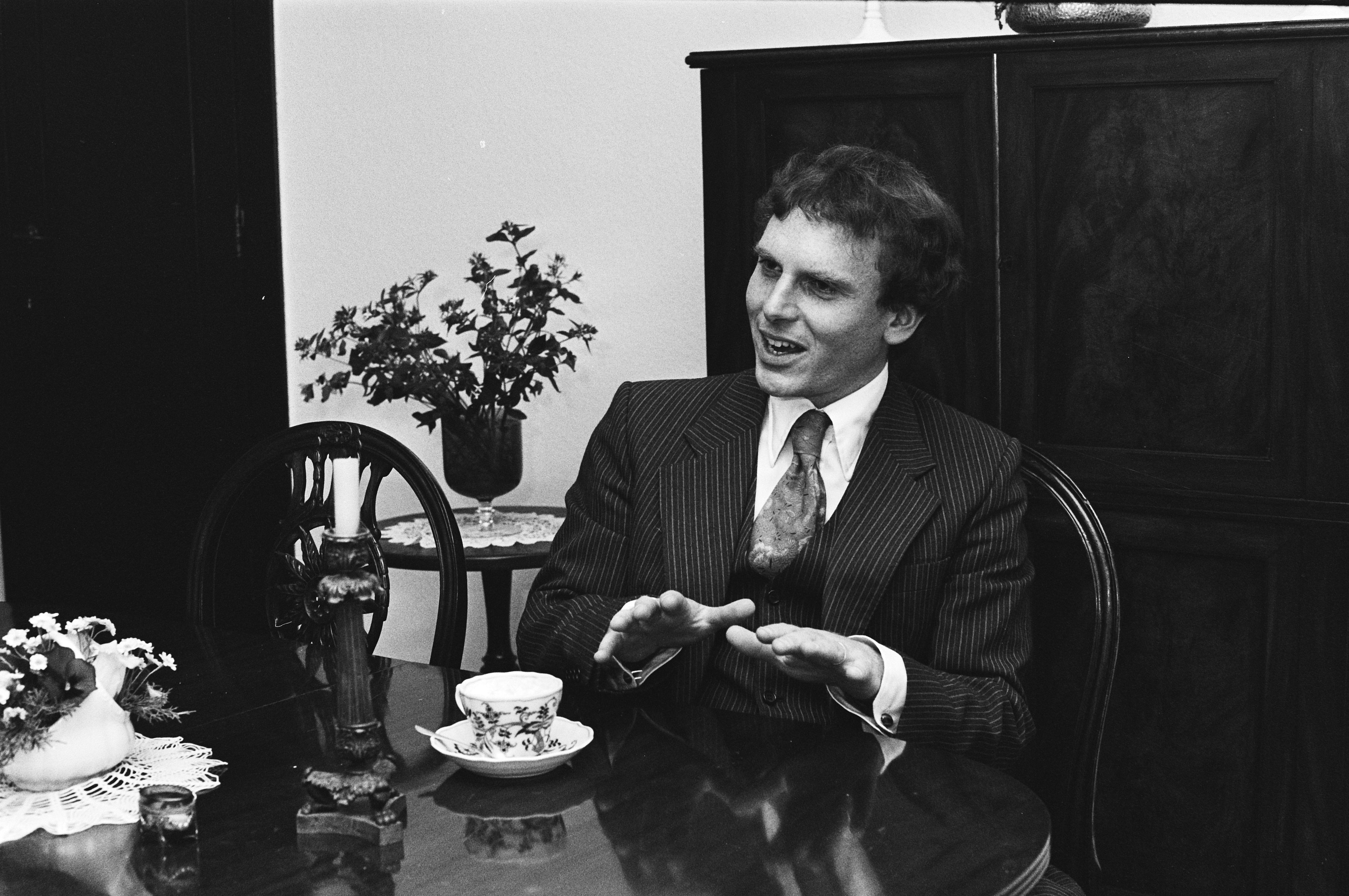 Collectie / Archief : Fotocollectie Anefo Reportage / Serie : [ onbekend ] Beschrijving : Opdracht Leidsch Dagblad ; pianist David Ward Datum : 22 juni 1980 Trefwoorden : Pianisten Instellingsnaam : Leidsch Dagblad Fotograaf : Pereira, Fernando / Anefo Auteursrechthebbende : Nationaal Archief Materiaalsoort : Negatief (zwart/wit) Nummer archiefinventaris : bekijk toegang 2.24.01.05 Bestanddeelnummer : 930-8911